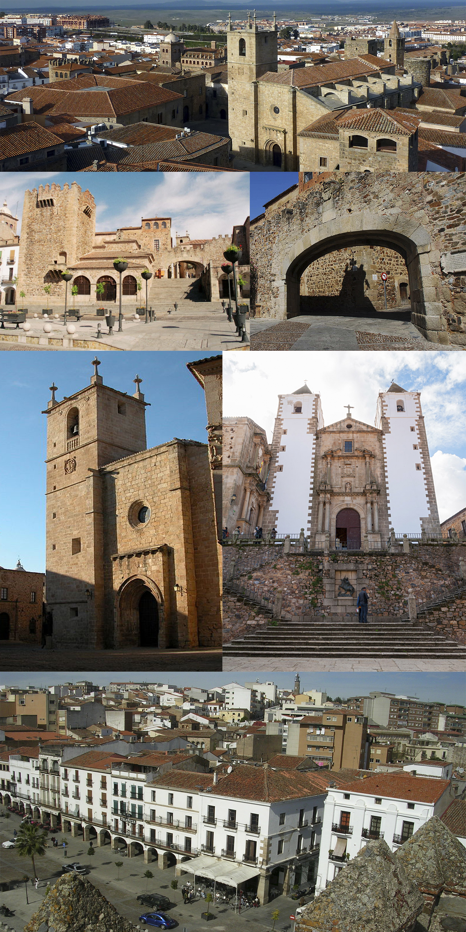 Collage de Cáceres